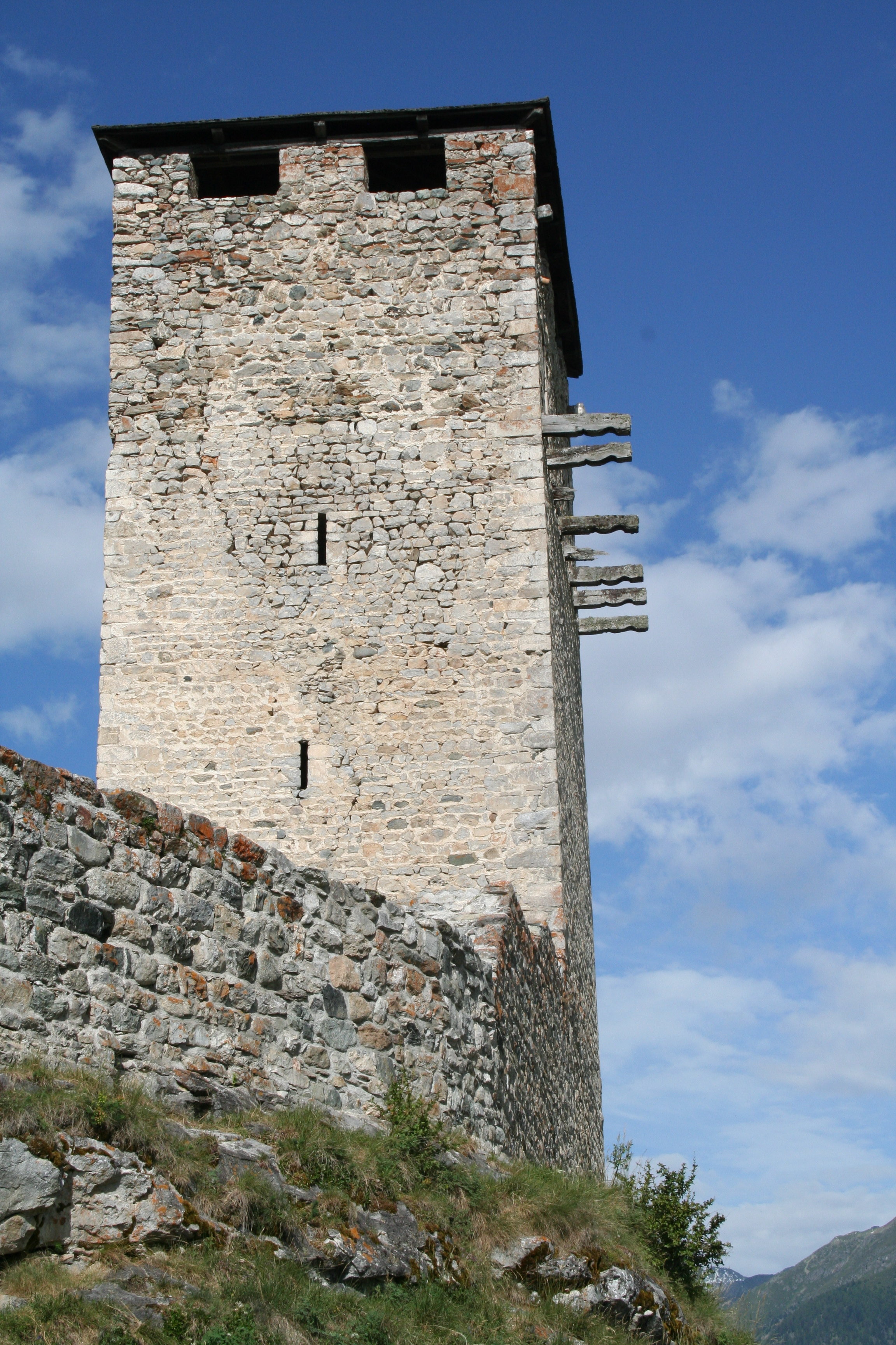 Ruine Steinsberg, Ostseite des Turms